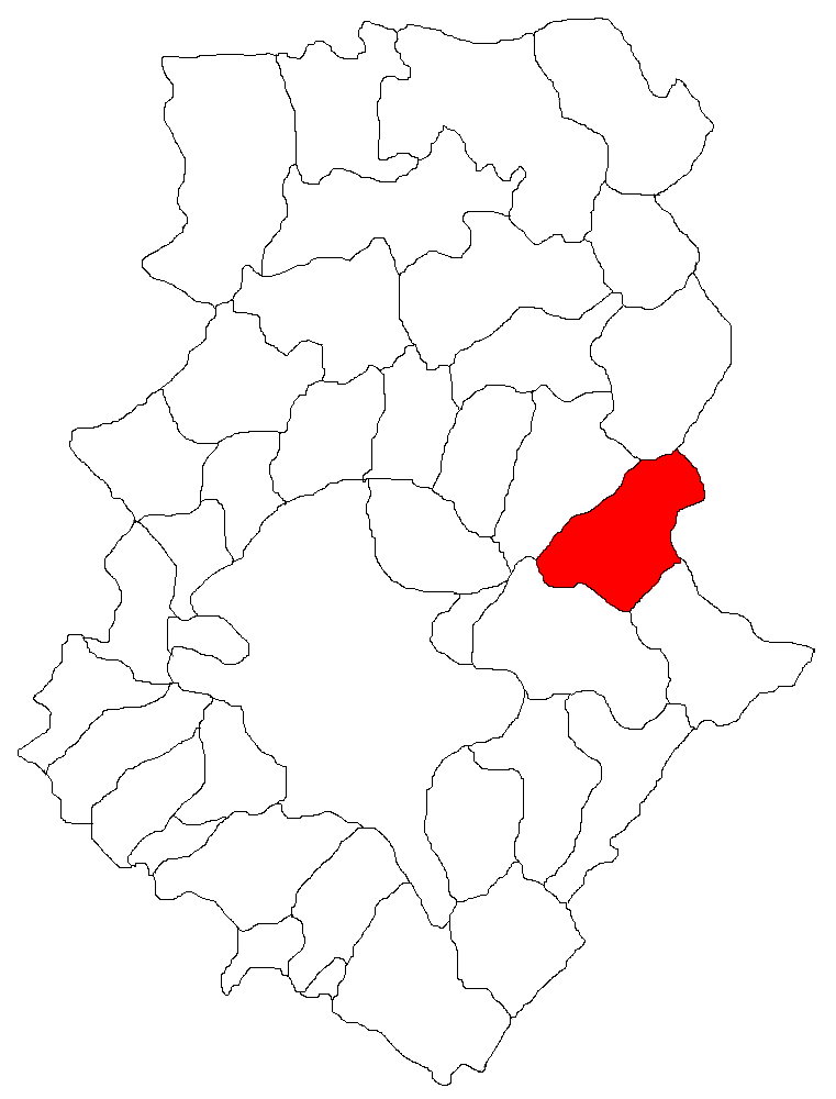 Categorie:Hărţi ale judeţului Ilfov